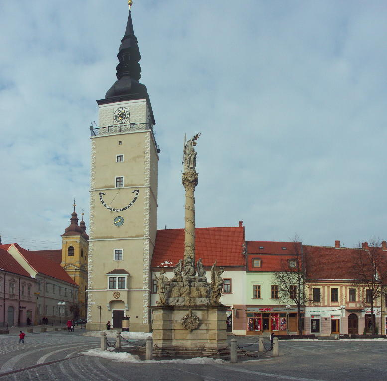 Mestská veža a Stĺp Najsv. Trojice na Trojičnom námestí v Trnave